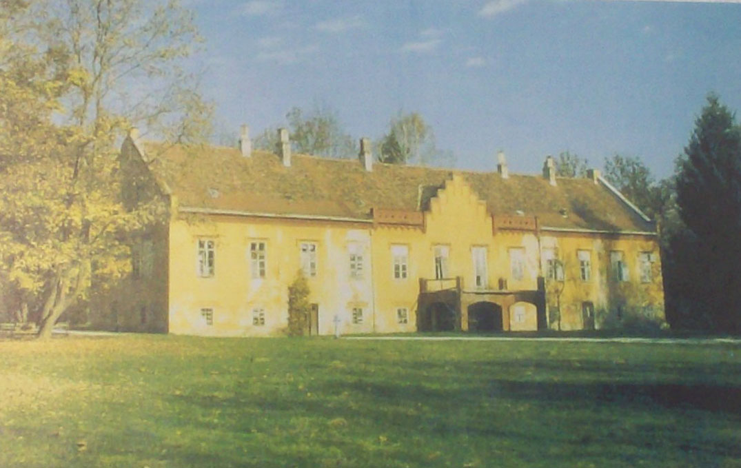 Novi dvori Jelačićevi u Zaprešiću prije obnove